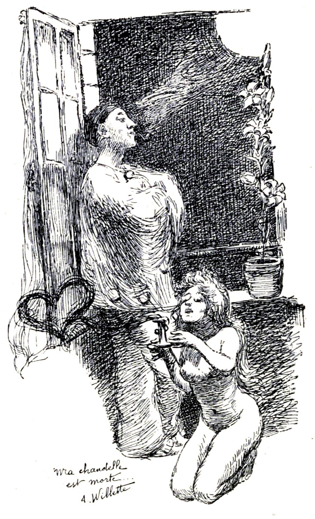 Ma Chandelle est morte